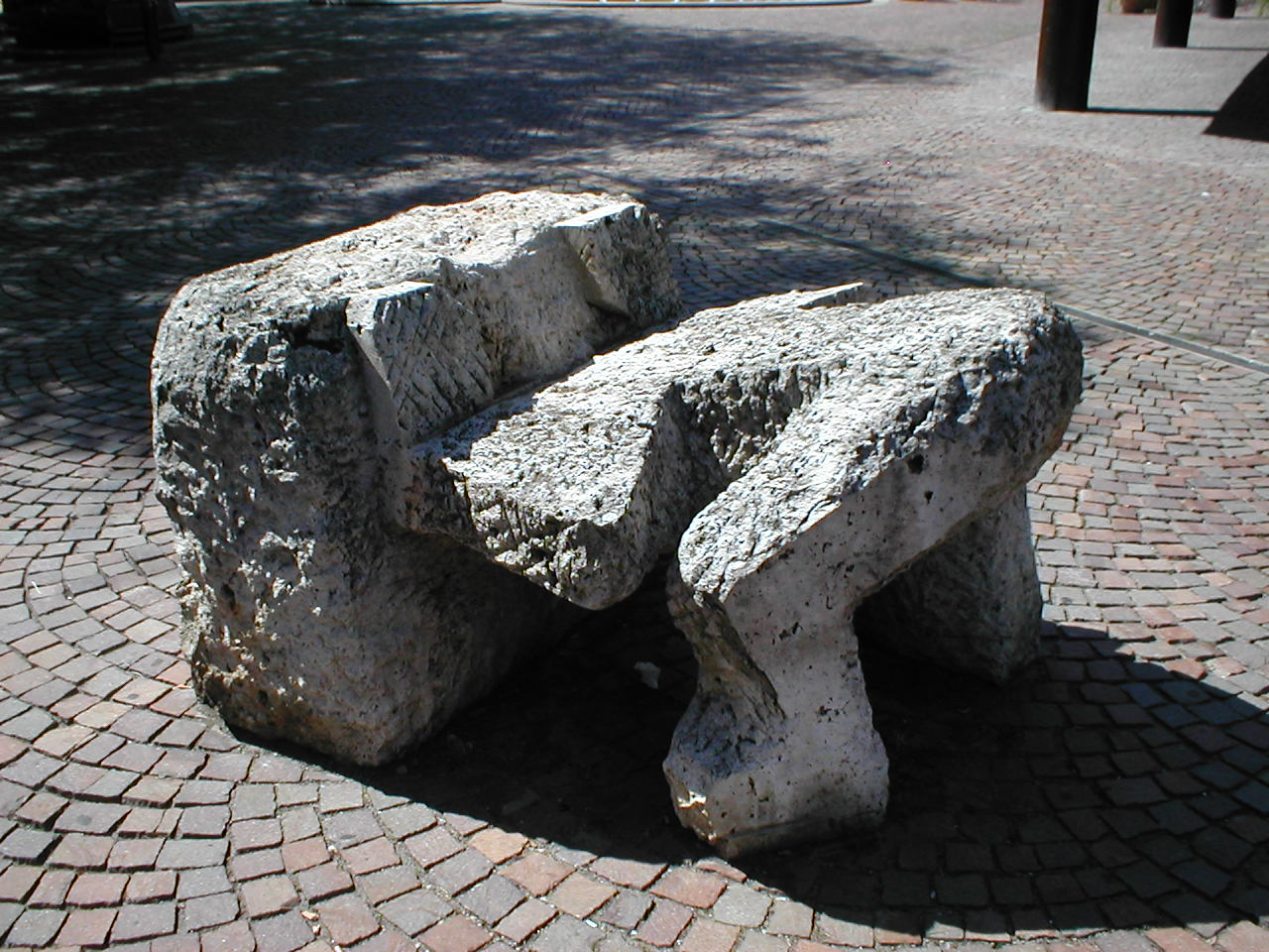 Skulptur "Befreiung" von Rainer Bergmann beim Stadttheater Heilbronn